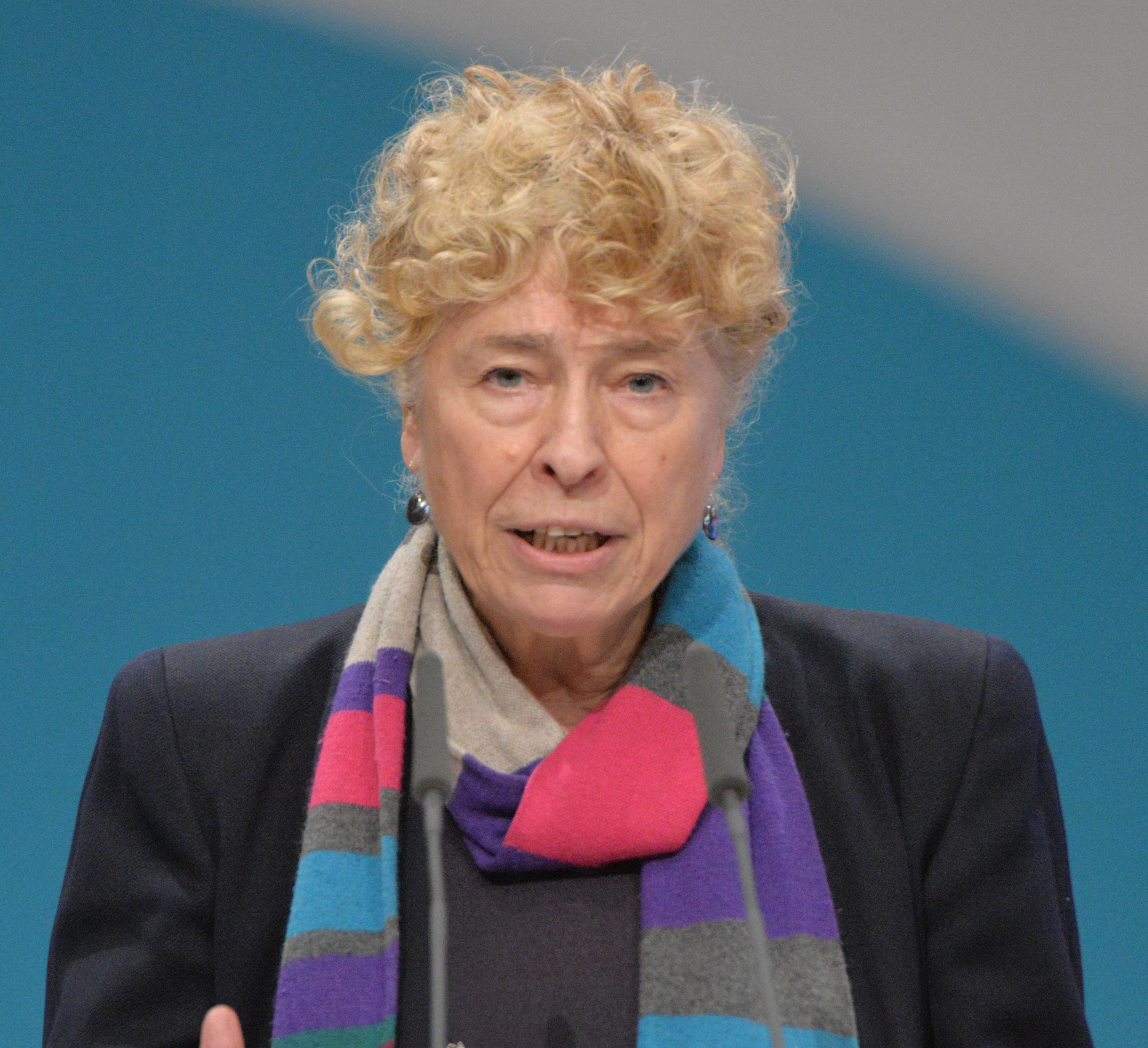 SPD Bundesparteitag Berlin, 10.-12. Dezember 2015, CityCube, Messe Berlin